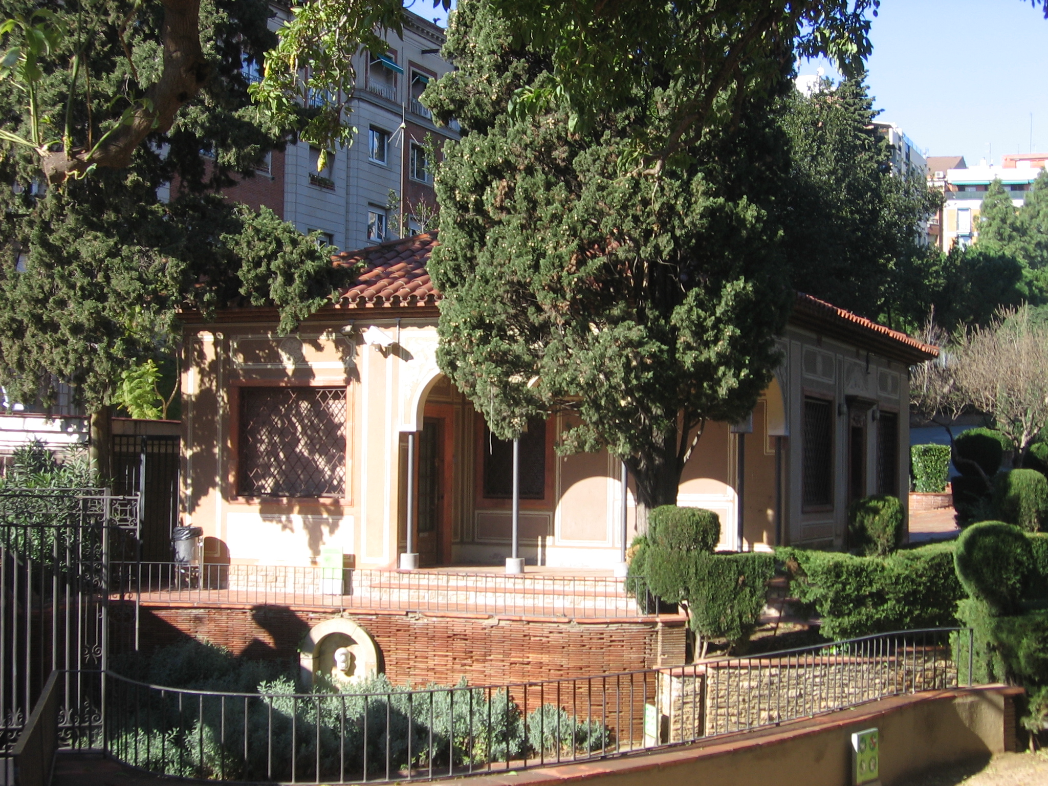 Parc de les Aigües (Barcelona).